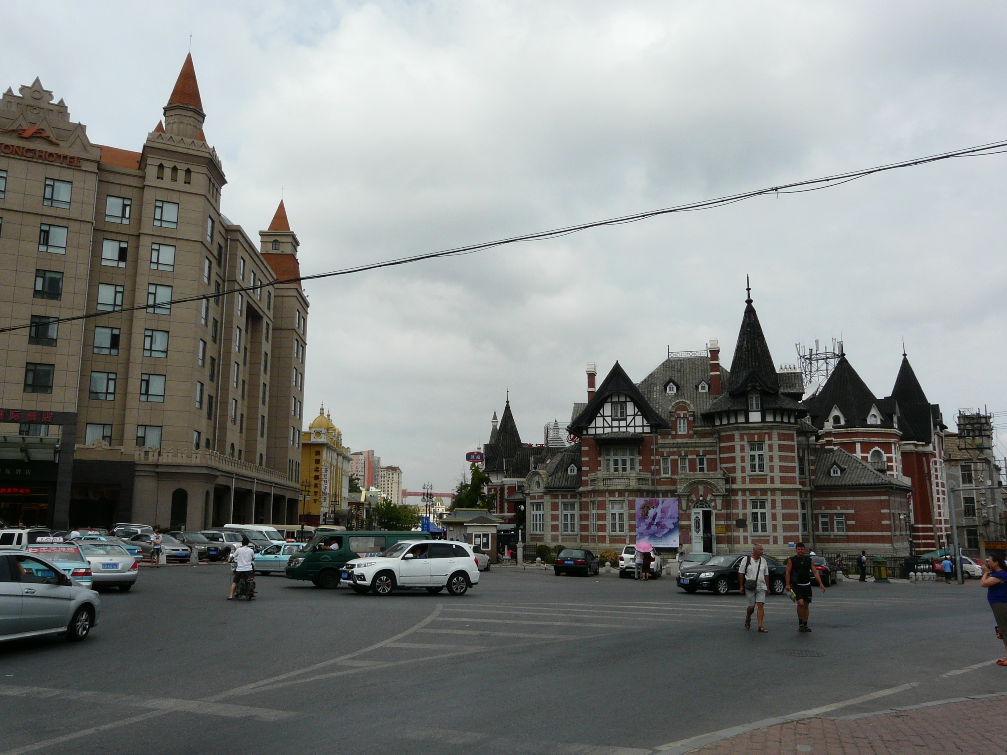 中文（中国大陆）: 2001年5月，露西亚町旧址俄罗斯风情街正式开街。